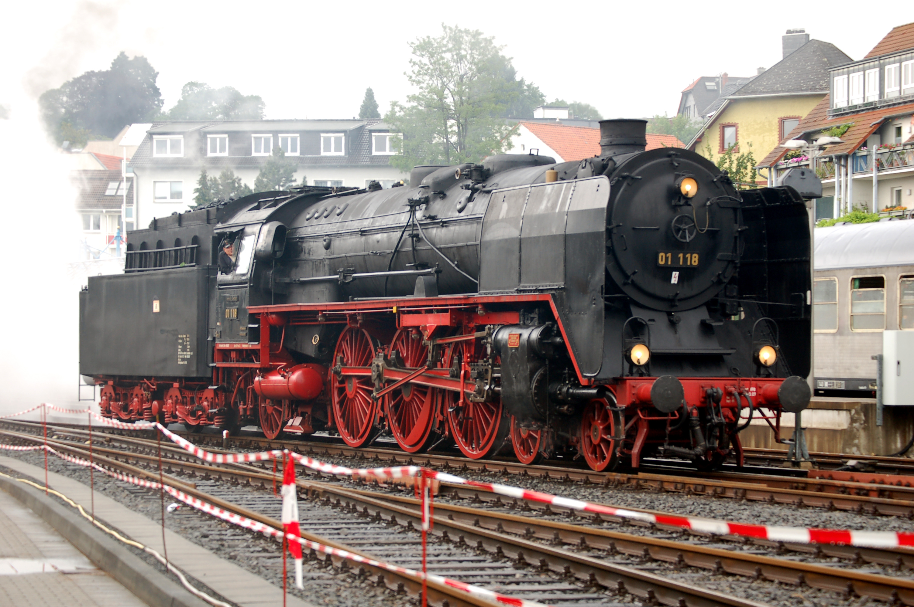 Dampflokomotive 01-118 der Historischen Eisenbahn Frankfurt beim Bahnhofsfest in Königstein, 27. Mai 2007